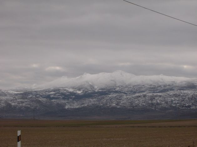 Picos Zapateros. Paramera de Ávila, España This is a photography of a Site of Community Importance in Spain with the ID: ES4110034. Natura2000 entry, EEA entry